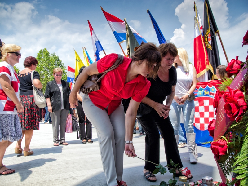 Povorka hrvatskog ponosa i slave; Dan državnosti u Rijeci, Most hrvatskih branitelja iz Domovinskog rata